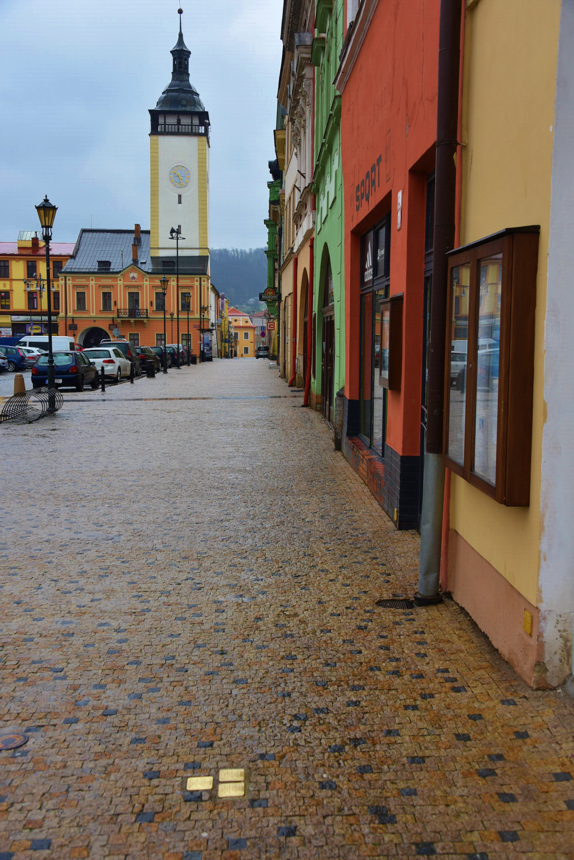 Stolpersteine in Hranice na Moravě